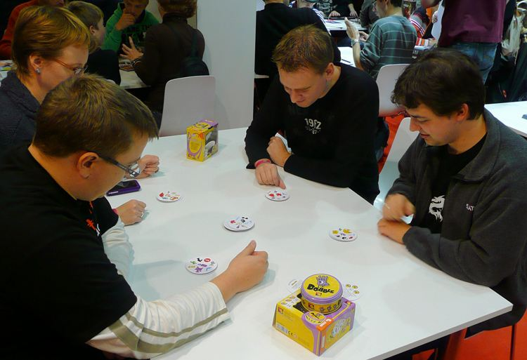 Jeu de société Dobble